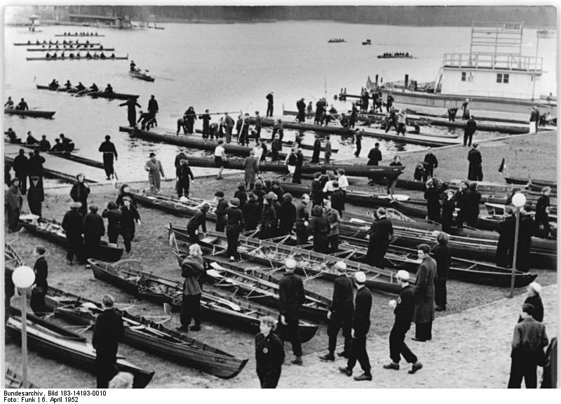 Berlin, Eröffnung der Rudersaison Zentralbild Funk St-We. 6.4.1952 Anrudern in Grünau. Das traditionelle Anrudern in Grünau wurde am Sonntag, dem 6. April, mit einer Sternfahrt eröffnet. Die Kanusportler starteten im Köpenicker Becken, während die Rudersportler von der Krampenburg Schmöckwitz aus nach dem Regattagelände Grünau ruderten. UBz: Fröhliches Gewimmel auf dem Regattagelände in Grünau. Leihweise Zentral Bild X